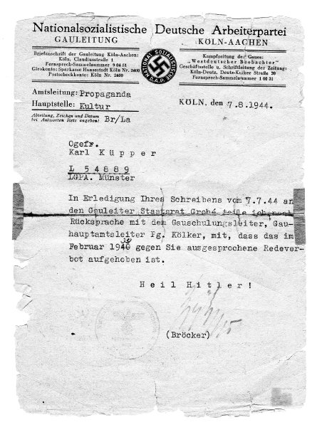 Aufhebung des Redeverbotes für Karl Küpper durch die NSDAP Gauleitung Köln-Aachen im Jahr 1944